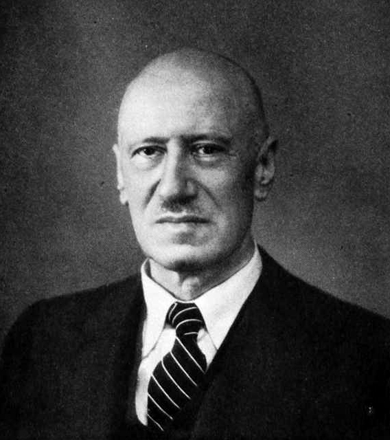 Portrait Max Meyerhof